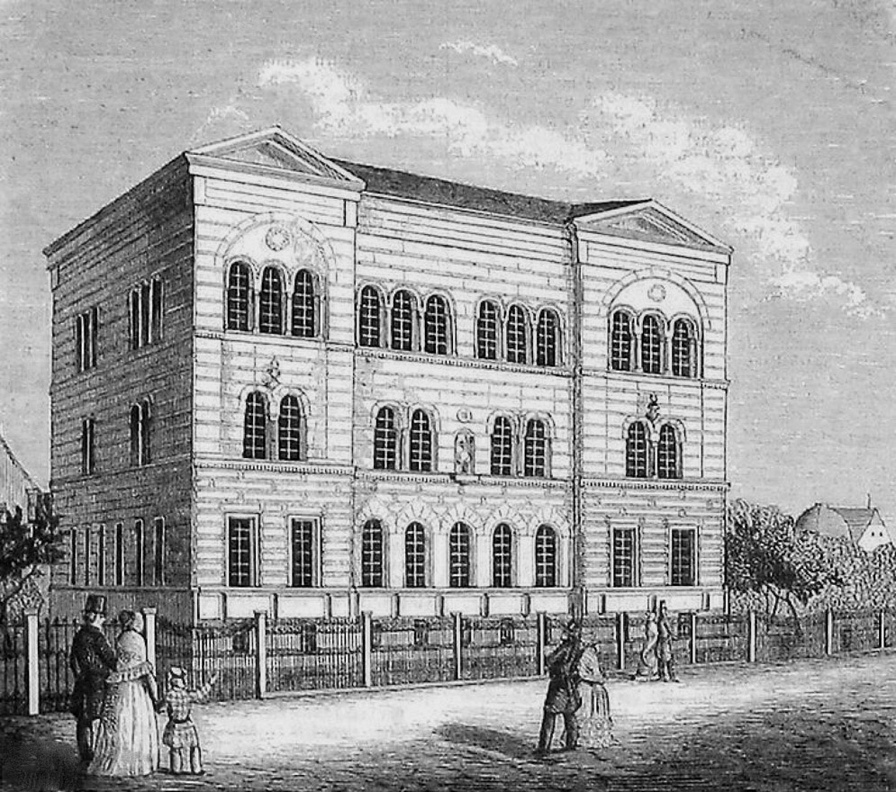 Ansicht des neuen Logengebäudes der Logen Apollo und Balduin zur Linde in Leipzig von der Ostseite